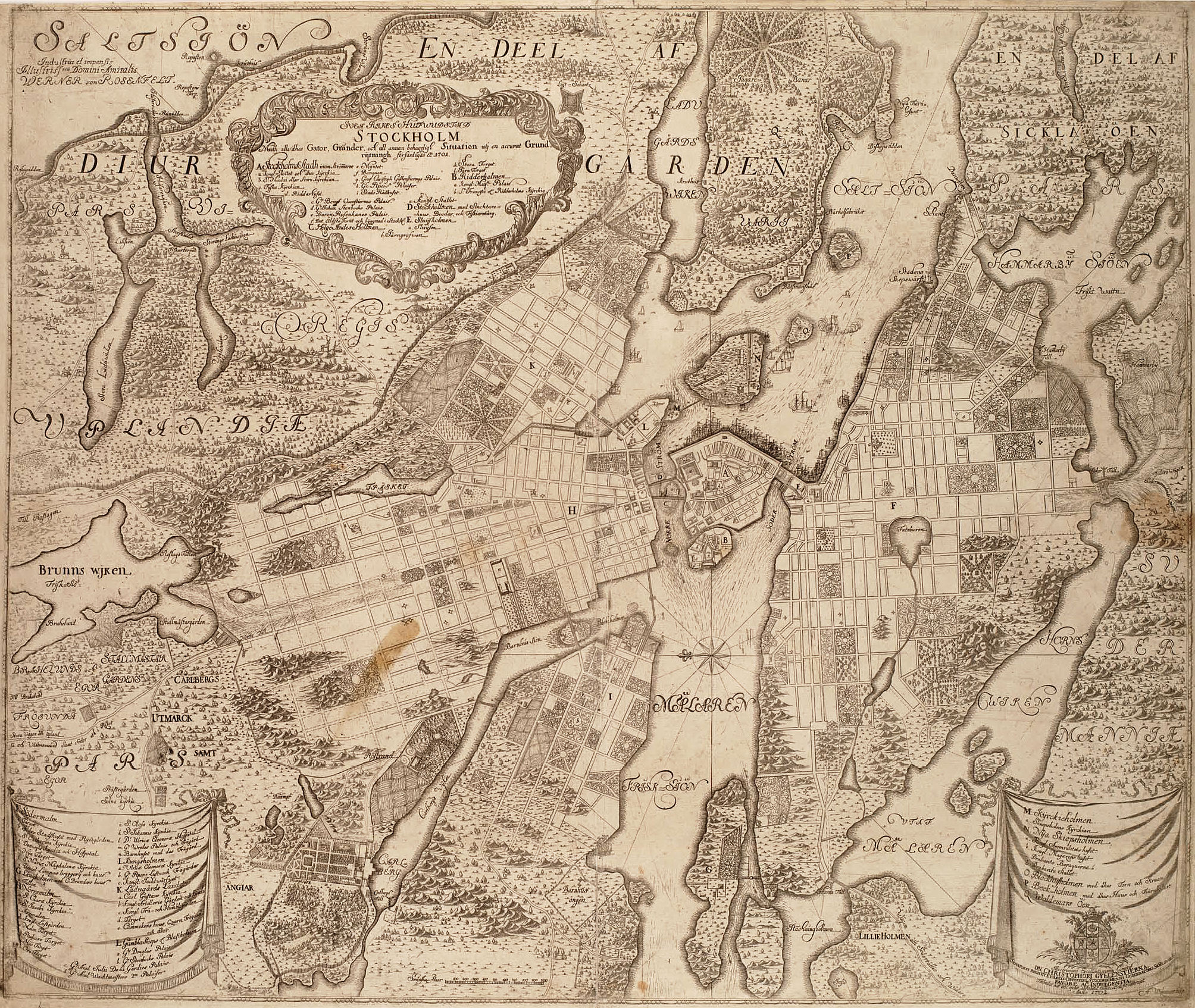 Karta över Stockholm från 1702 av A. Wijkman